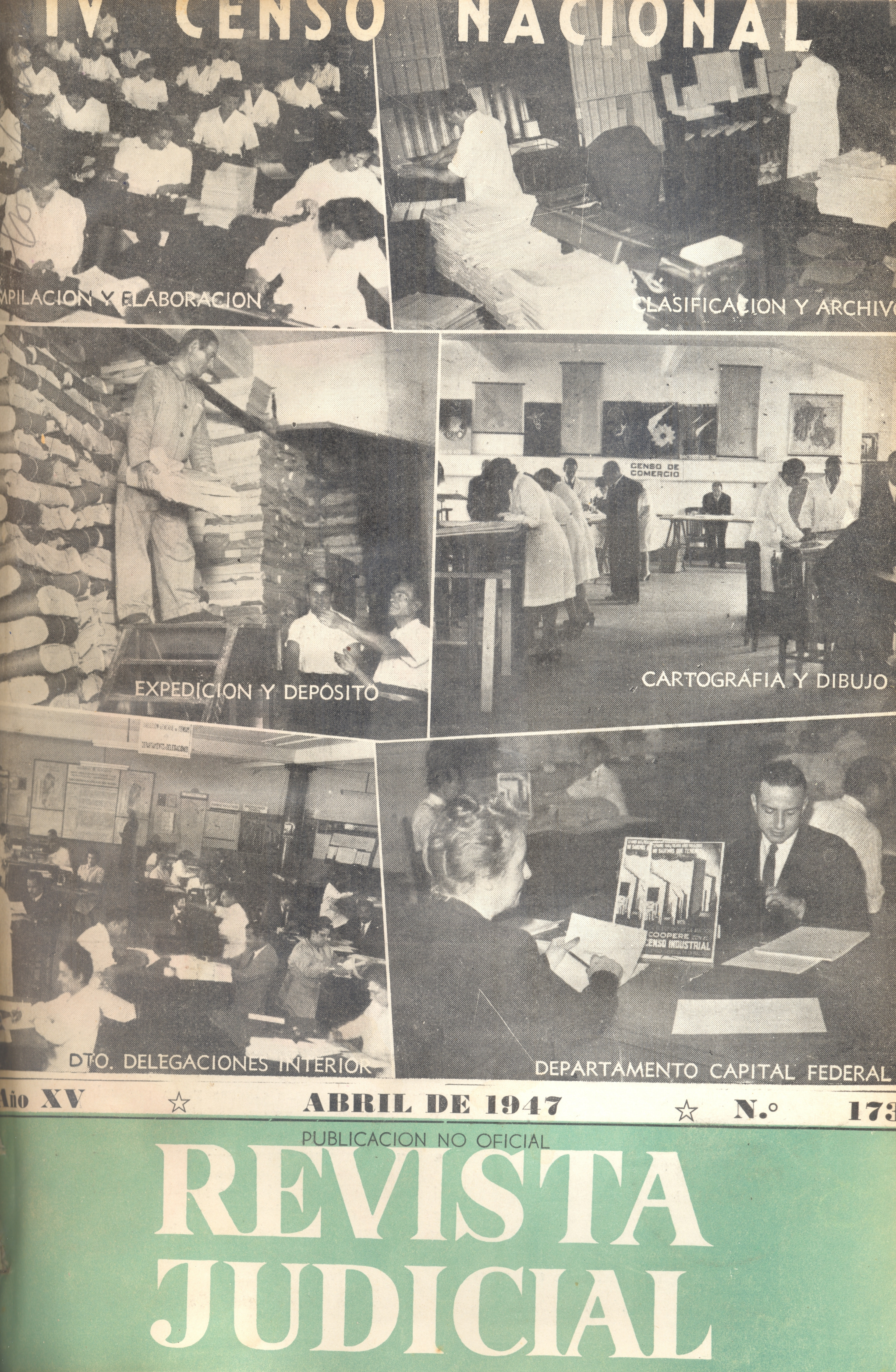 Revista Judicial nº173: "IV censo nacional".